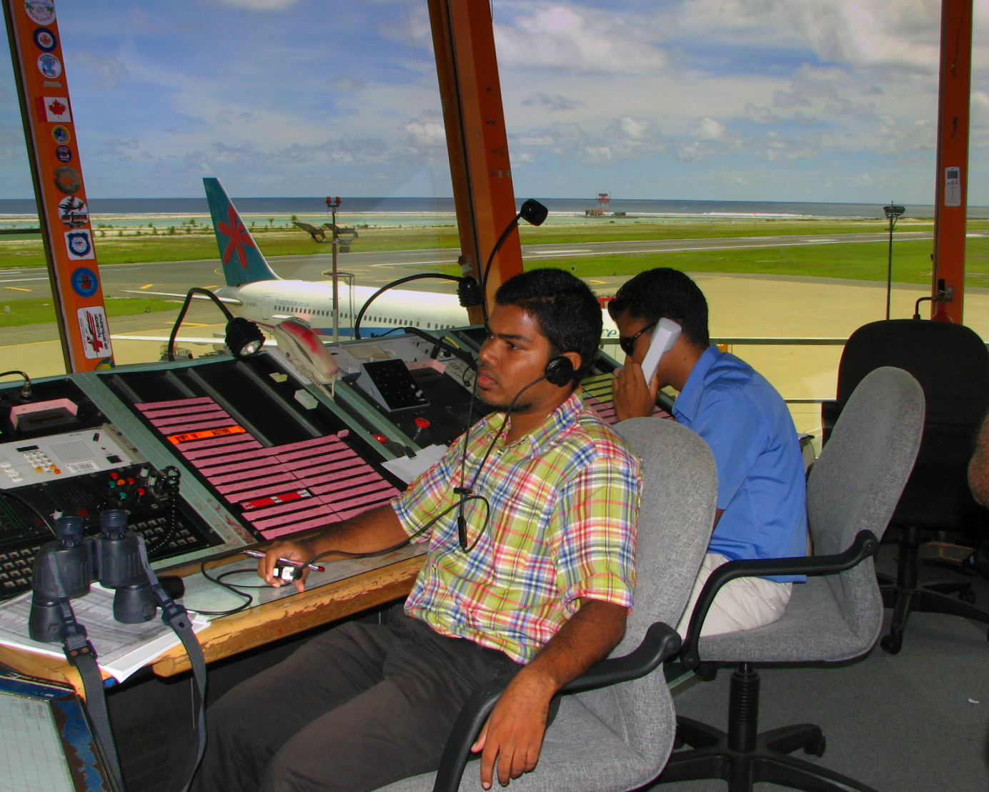 Tower